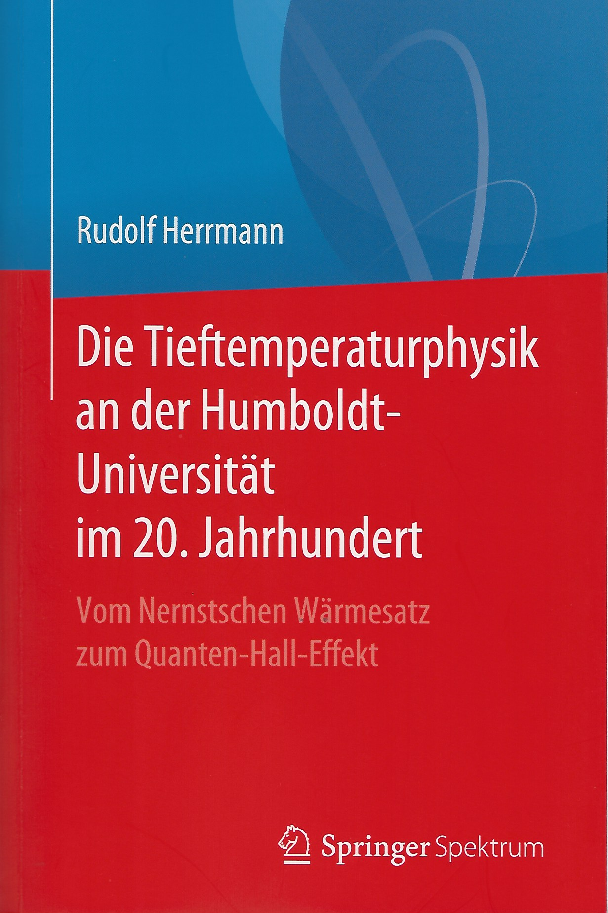 Die Tieftemperaturphysik an der Humboldt Universität im 20. Jahrhundert